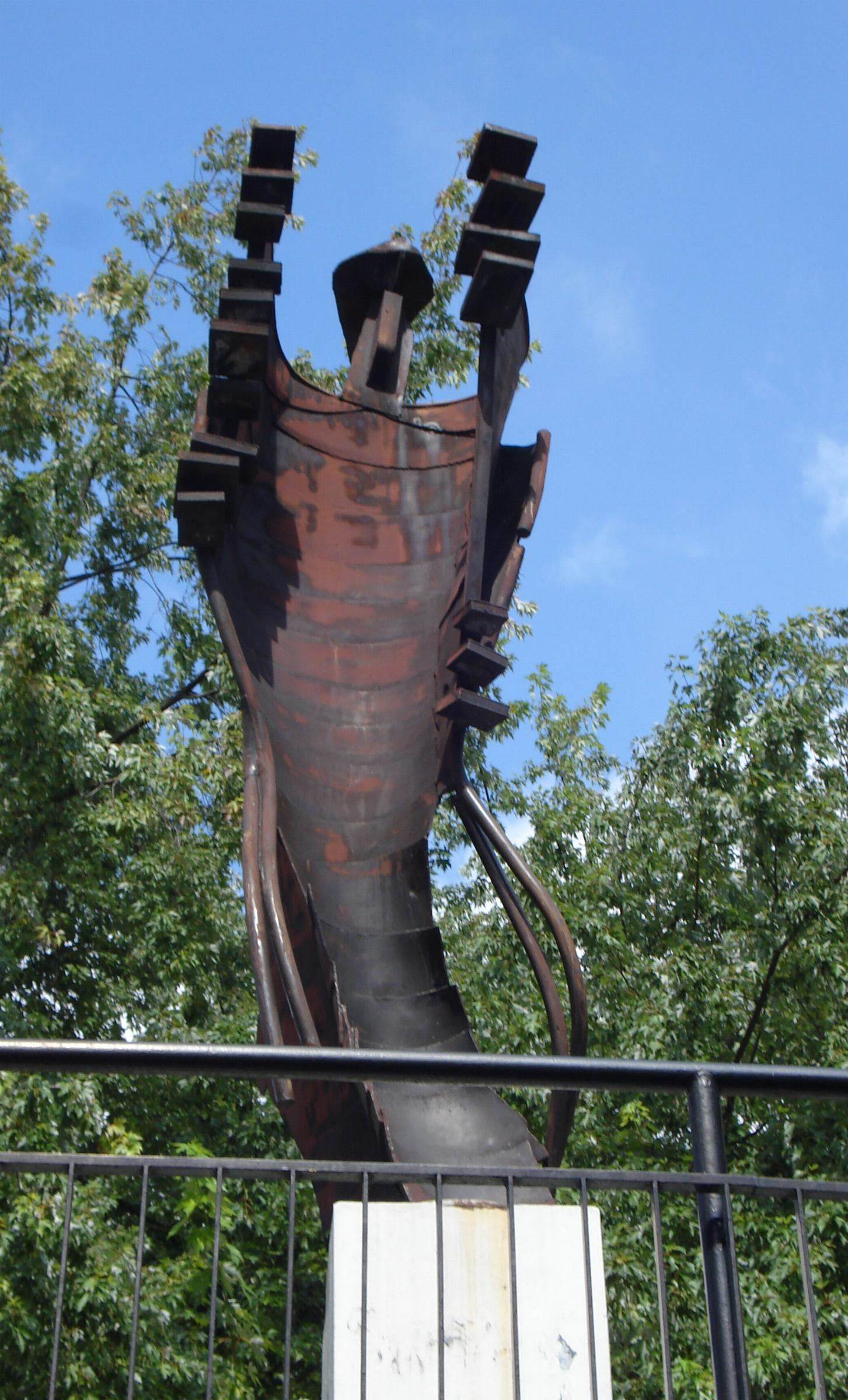 Rotterdam, hoek Blaak - Binnenrotte. Kunstwerk zonder titel van Hans Ittmann. Rotterdam/The Netherlands.